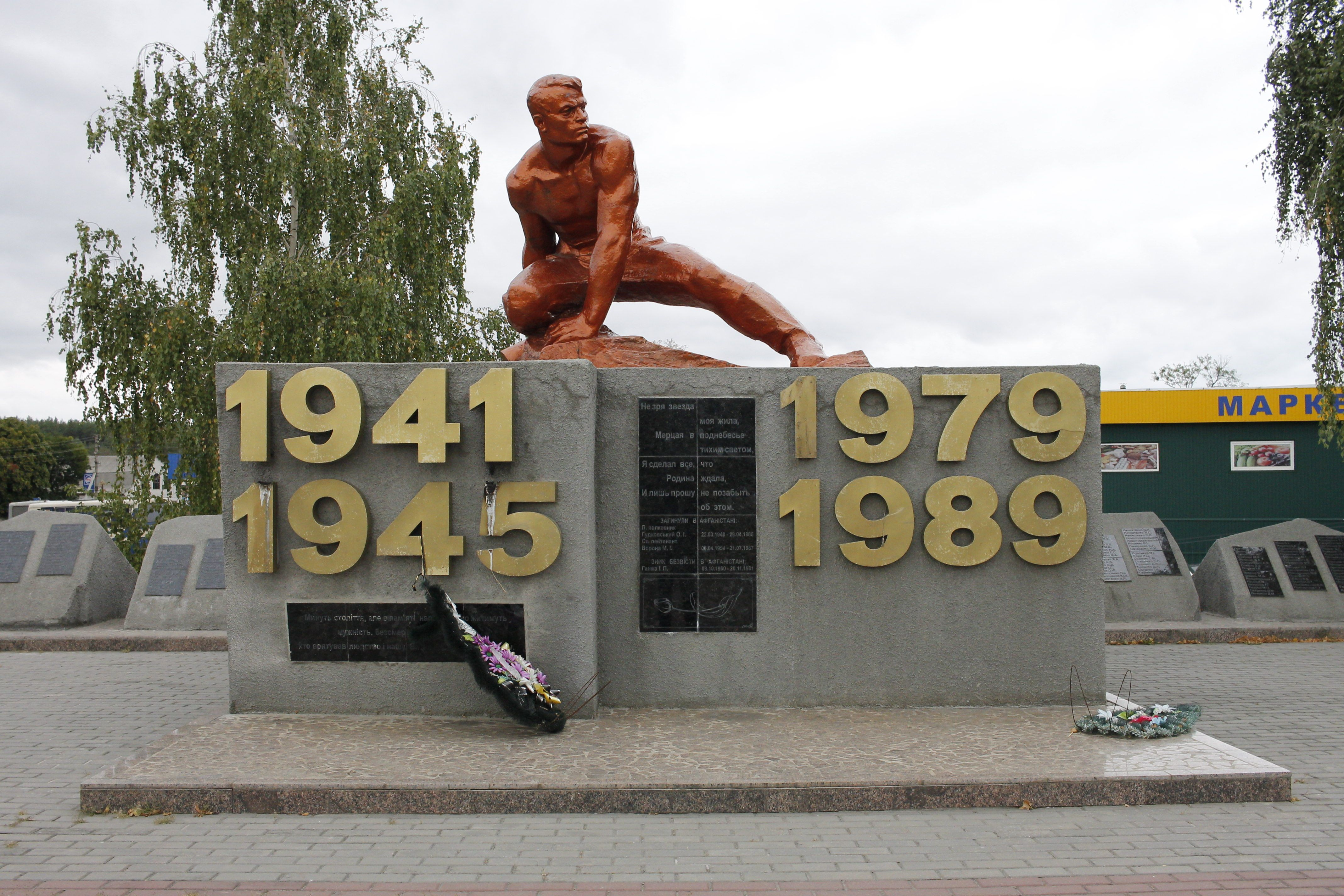 Пам'ятник односельчанам 1941-1945 р.р., Чигирин